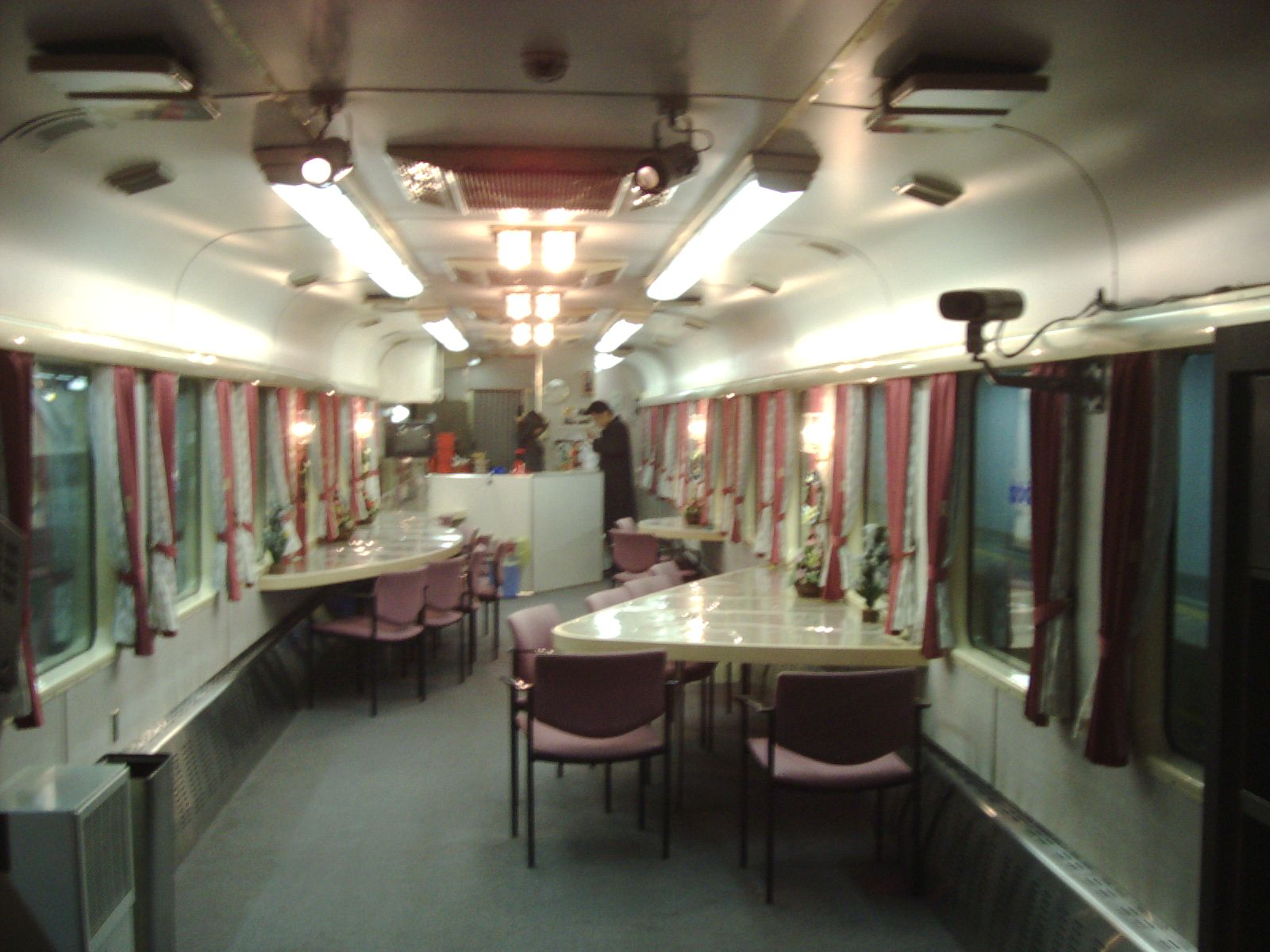 ユーロライナー オロ12 703 - カフェラウンジ車 内部